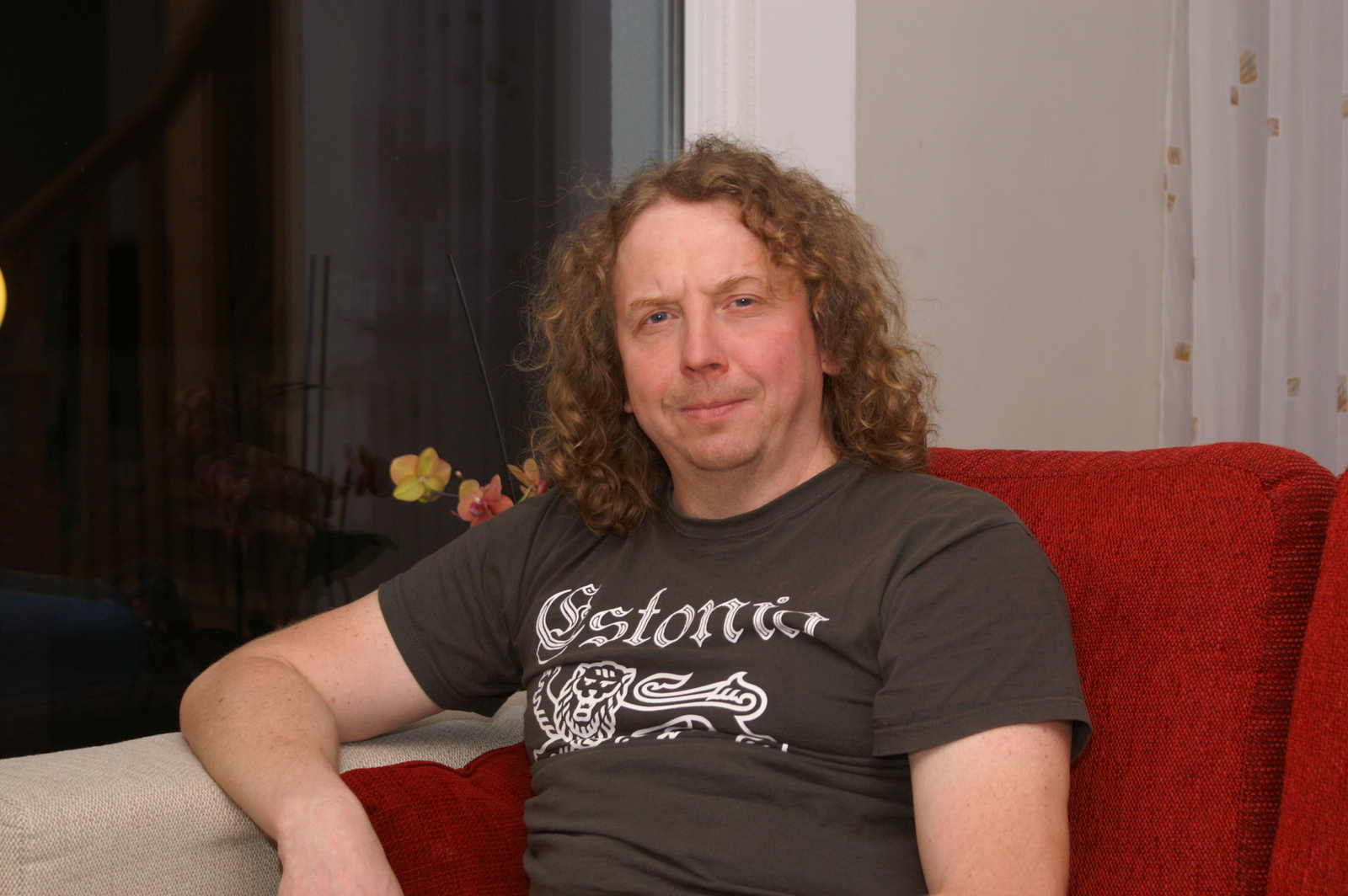 Pilt kujutab Madis Arukaske diivanil istumas.